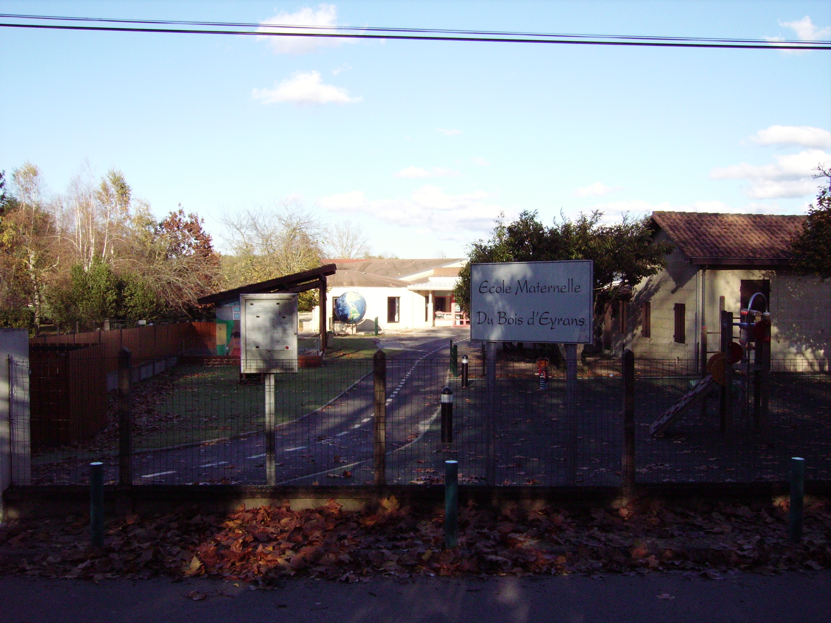 Ecole maternelle du bois d'Eyrans à Saint Médard d'Eyrans